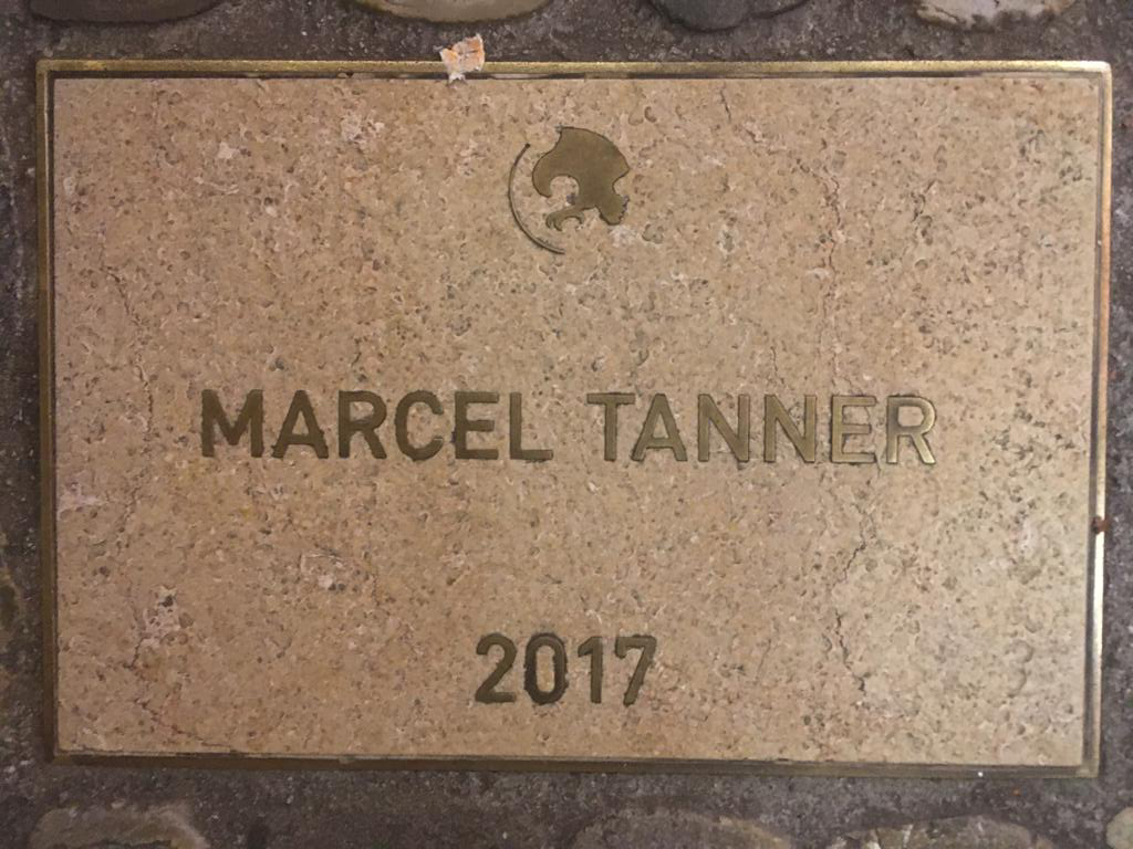 Ehrung für Marcel Tanner auf dem Walk of Spalebärg